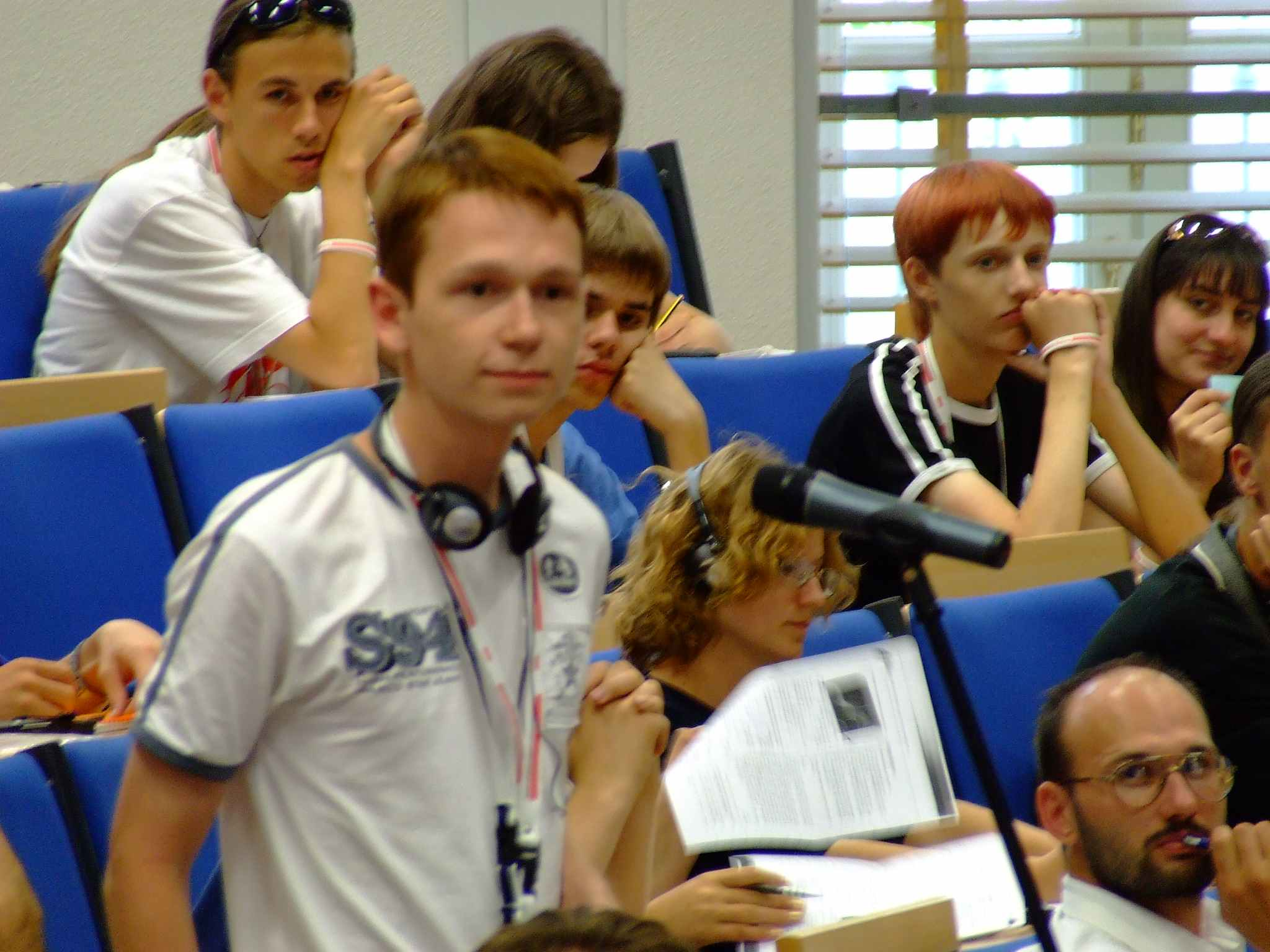 Uładzisłau Michajłou